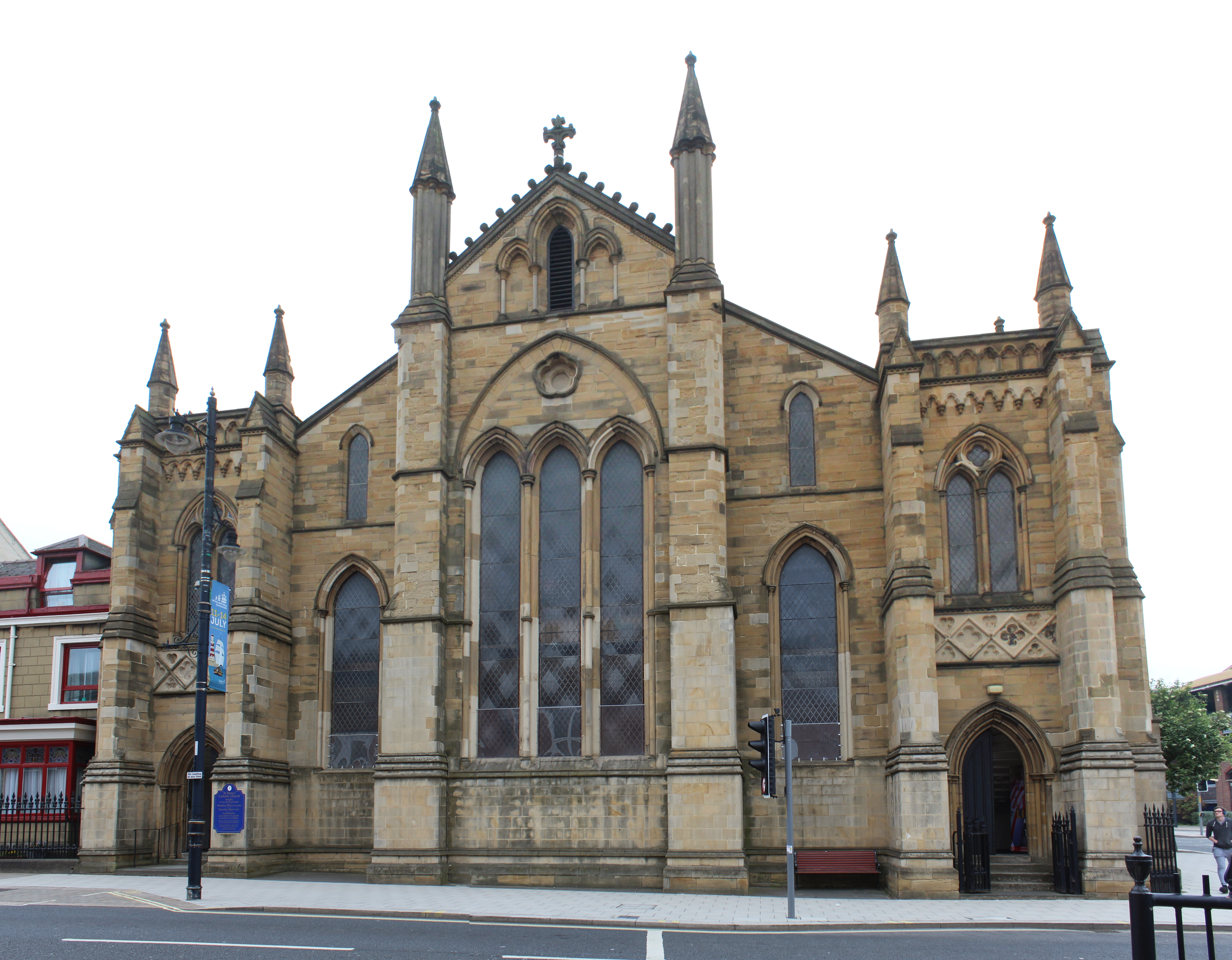 Église Sainte-Marie, Sunderland.